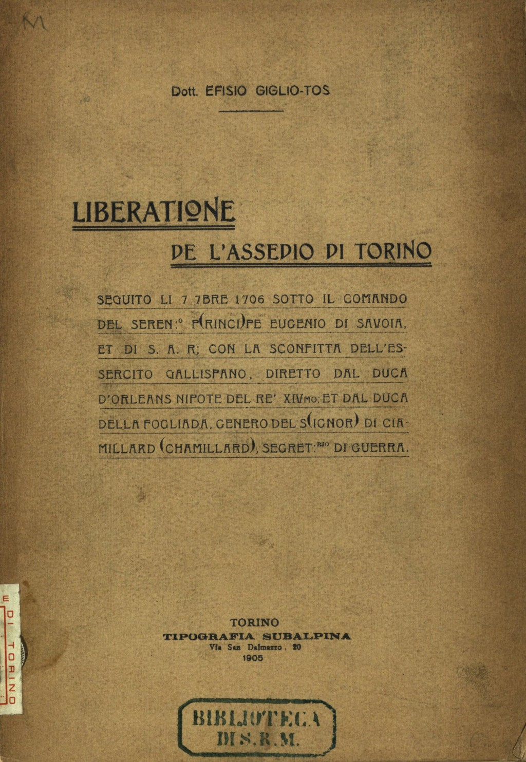 Couverture d'un ouvrage d'Efisio Giglio-Tos paru en 1906.